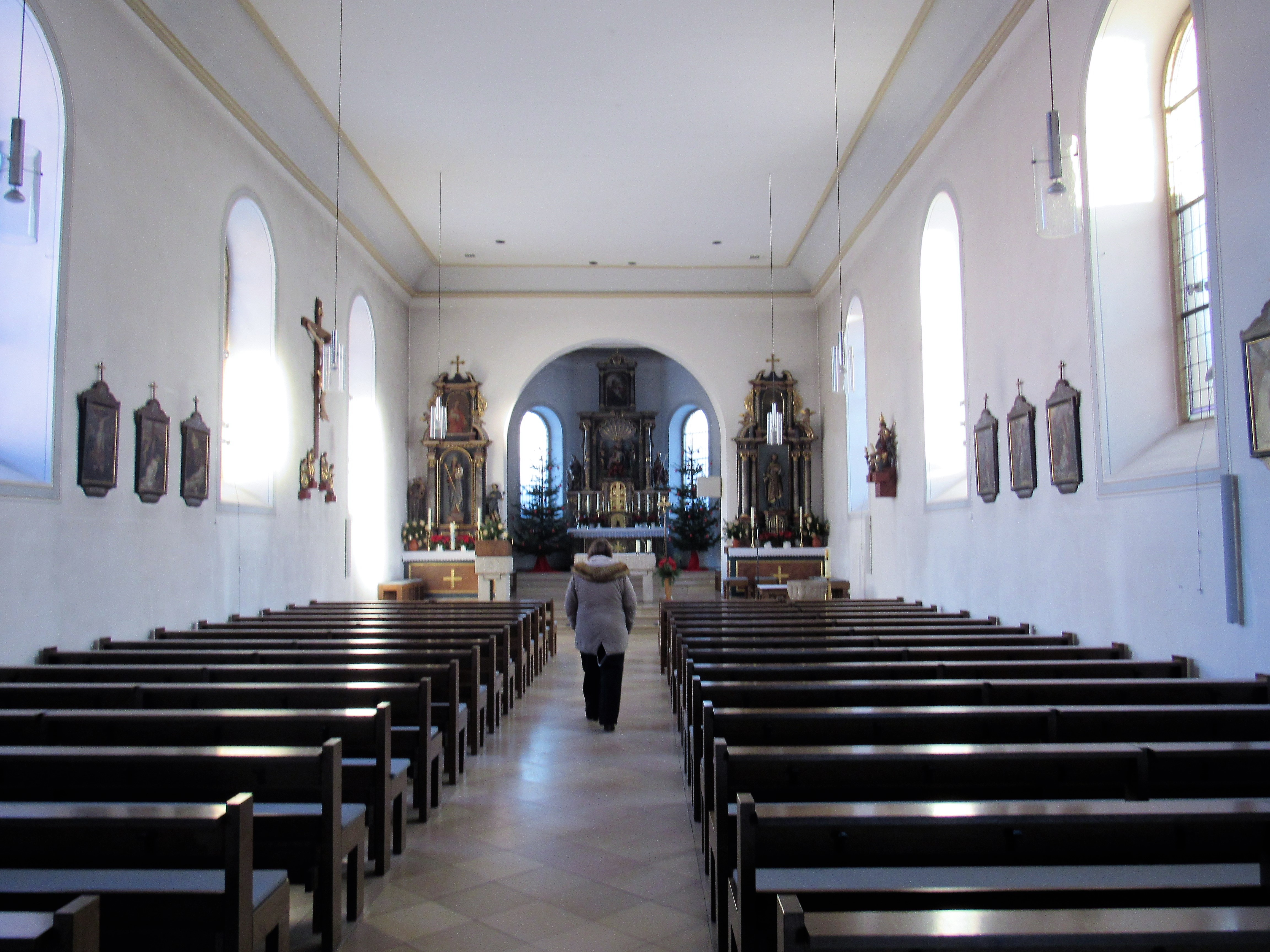 Kirche in Riedenberg innen